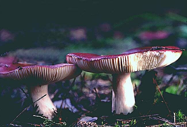 Amethysttäubling